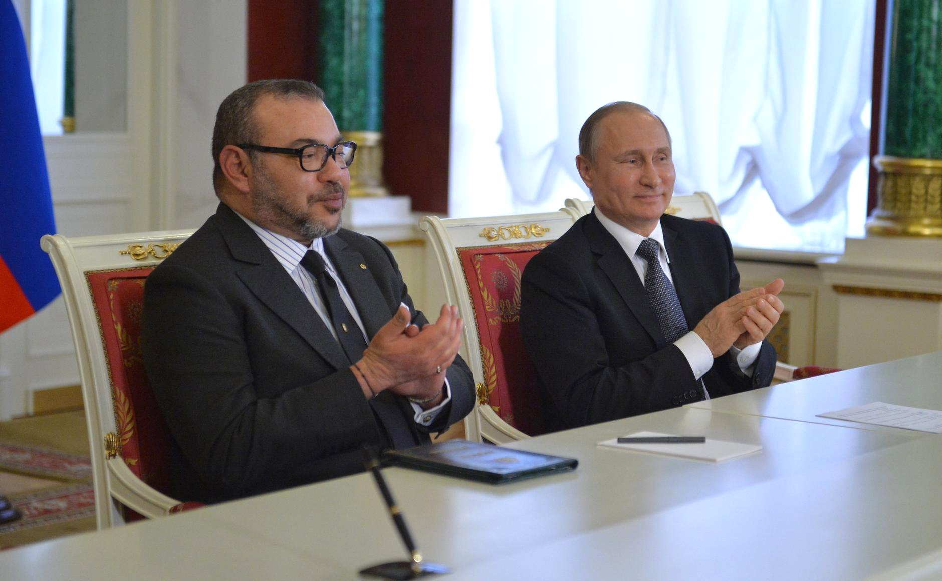 Встреча Президента России Владимира Путина с Королём Марокко Мухаммедом VI. Во время церемонии подписания российско-марокканских документов